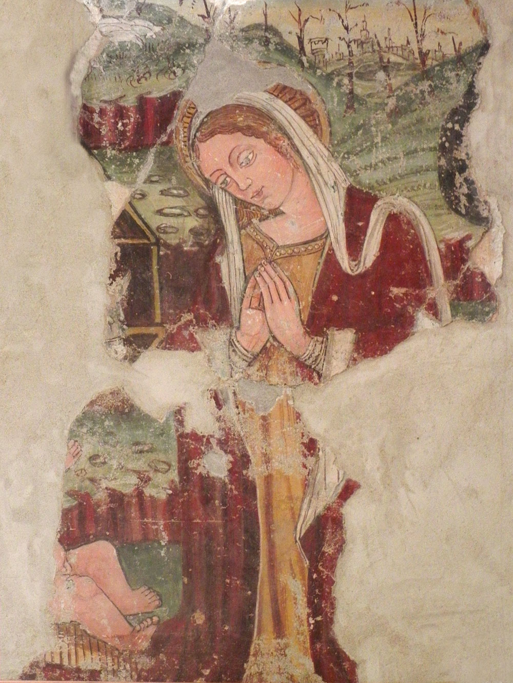 Gorno, Chiesa della Madonna delle Grazie, dettaglio dell'affresco rinascimentale con rappresentata la Natività.